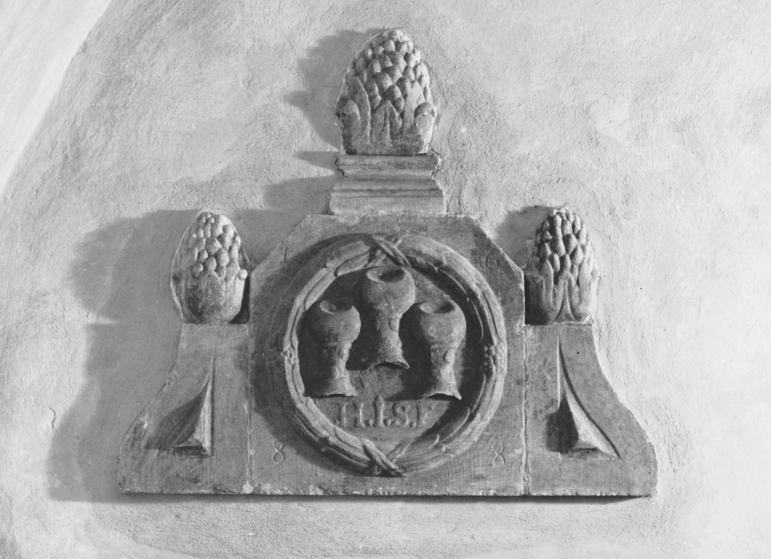 Källaren Tre Remmarens gamla skylt, portalöverstycke i sandsten. Med årtalet 1688 och krögaren Håkan Joensson Ekmans initialer (H.J.S.E.) finns på Stockholms stadsmuseum